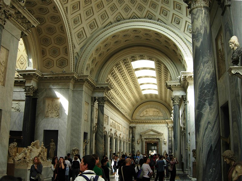 Vatican Pius Clementine Museum, auch Museum Chiaramonti nach seinem Begründer Papst Pius VII. Chiaramonti (1800–1823) benannt. Das Museum wurde 1807 durch den klassizistischen Bildhauer Antonio Canova eingerichtet.